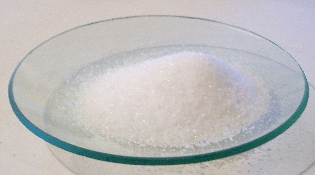 NaCl